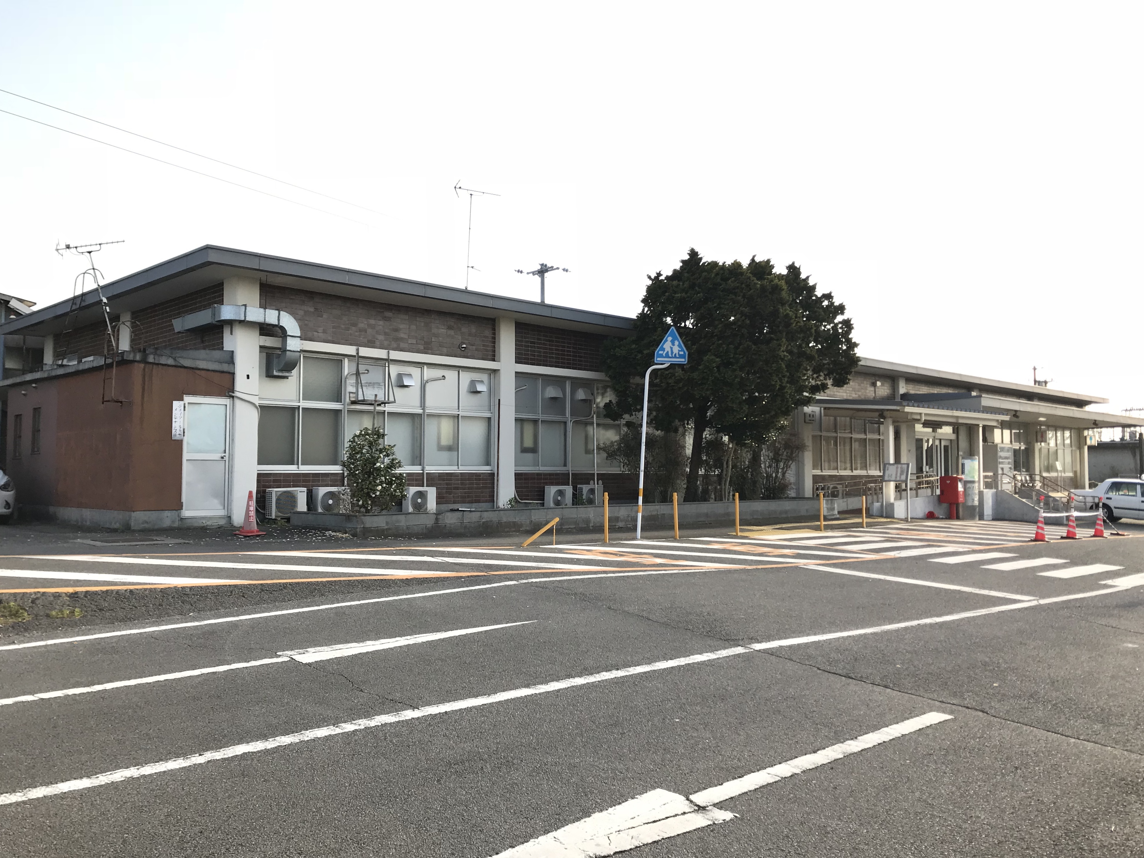 柳ヶ浦駅の駅舎